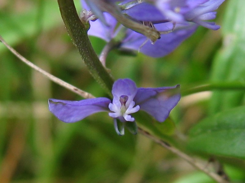 Gewöhnliche Kreuzblume Polygala vulgaris, Rügen